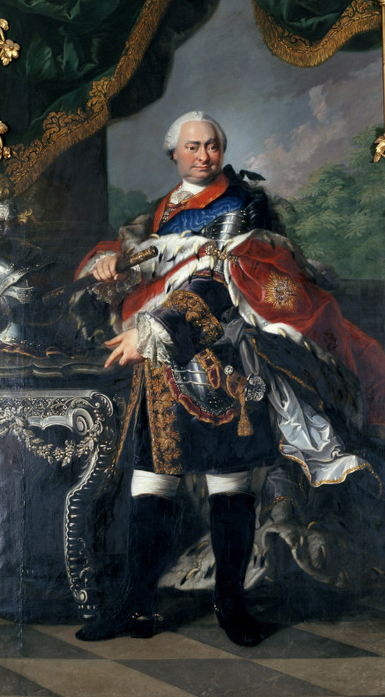 Porträt des Fürsten Johann Friedrich von Schwarzburg-Rudolstadt (1721—1767)